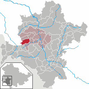 Oepfershausen in Thuringia - District Schmalkalden-Meiningen